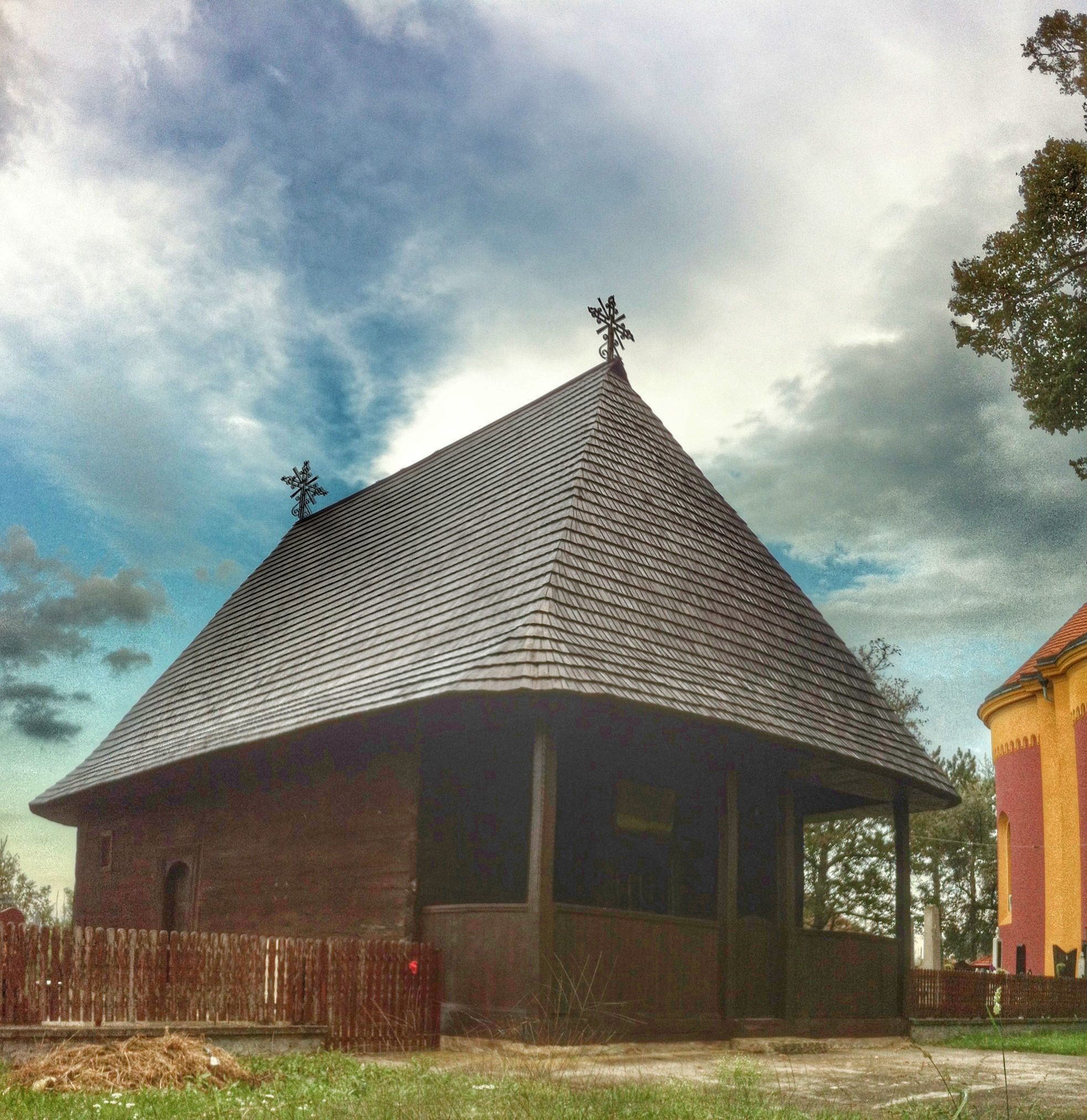 Српски (ћирилица): Црква је подигнута на иницијативу мештана Лозовика и Сараораца. Са градњом се почело око 1806.године али је завршена тек 1831.године. Црква је грађена од храстових талпи на темељима од ломљеног камена и покривена ситном шиндром која личи на клис (првобитни покривач је била шиндра димензија сличних као на цркви Манастира Покајница. Иконе на иконостасу је осликао Јован Стергевић током 1831-2. У порти цркве је постојала и школа и дрвена звонара са звонима која је поклонио Кнез Милош.